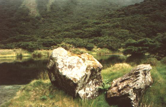 Lagoa Negra, vegetação endémica, Serra de Santa Bárbara, Angra do Heroísmo, ilha Terceira, Açores, Portugal.